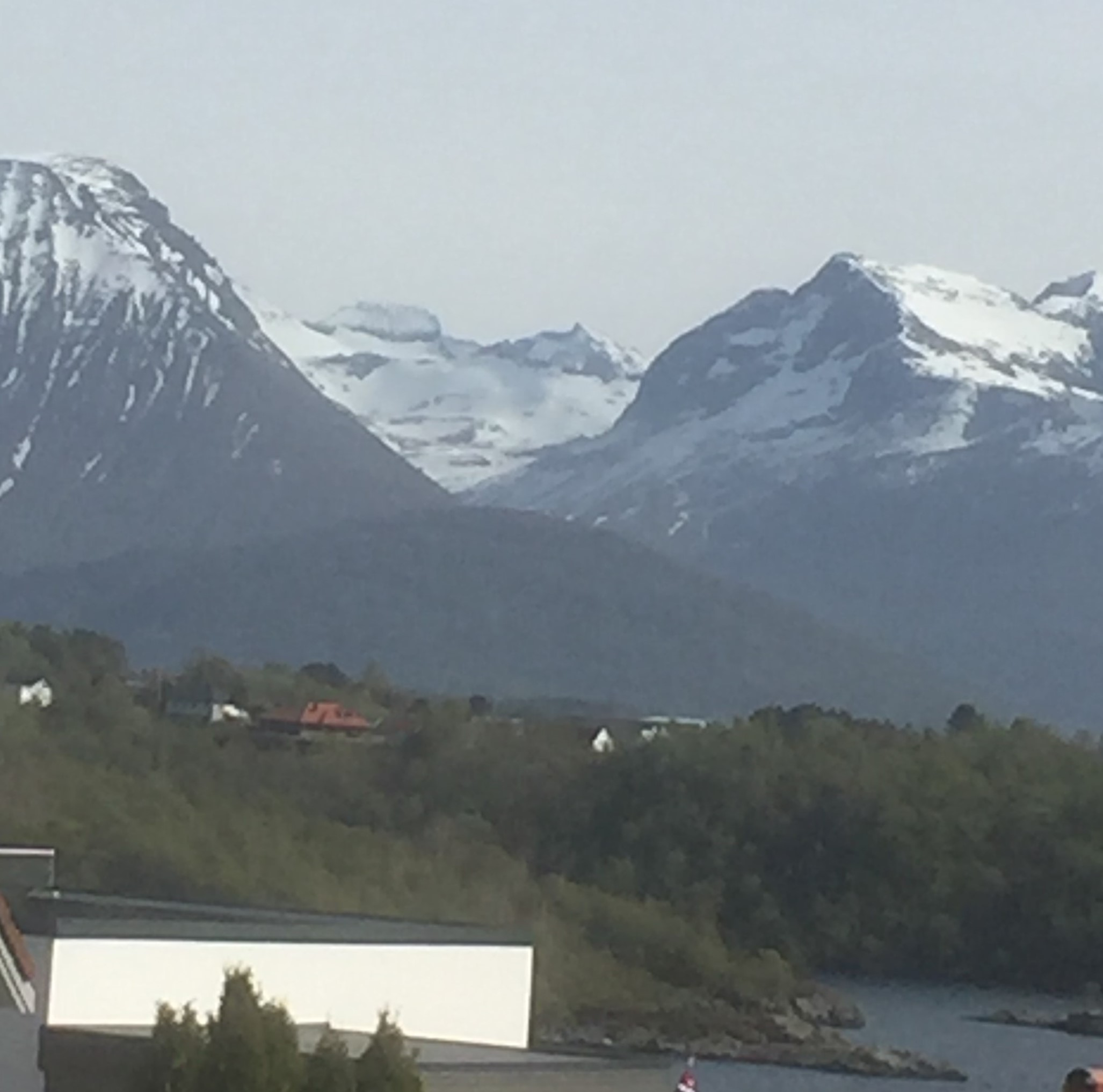 Råna Sunnmøre